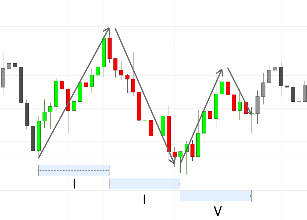 Ichimoku - Combinaison de vagues I, I, et V